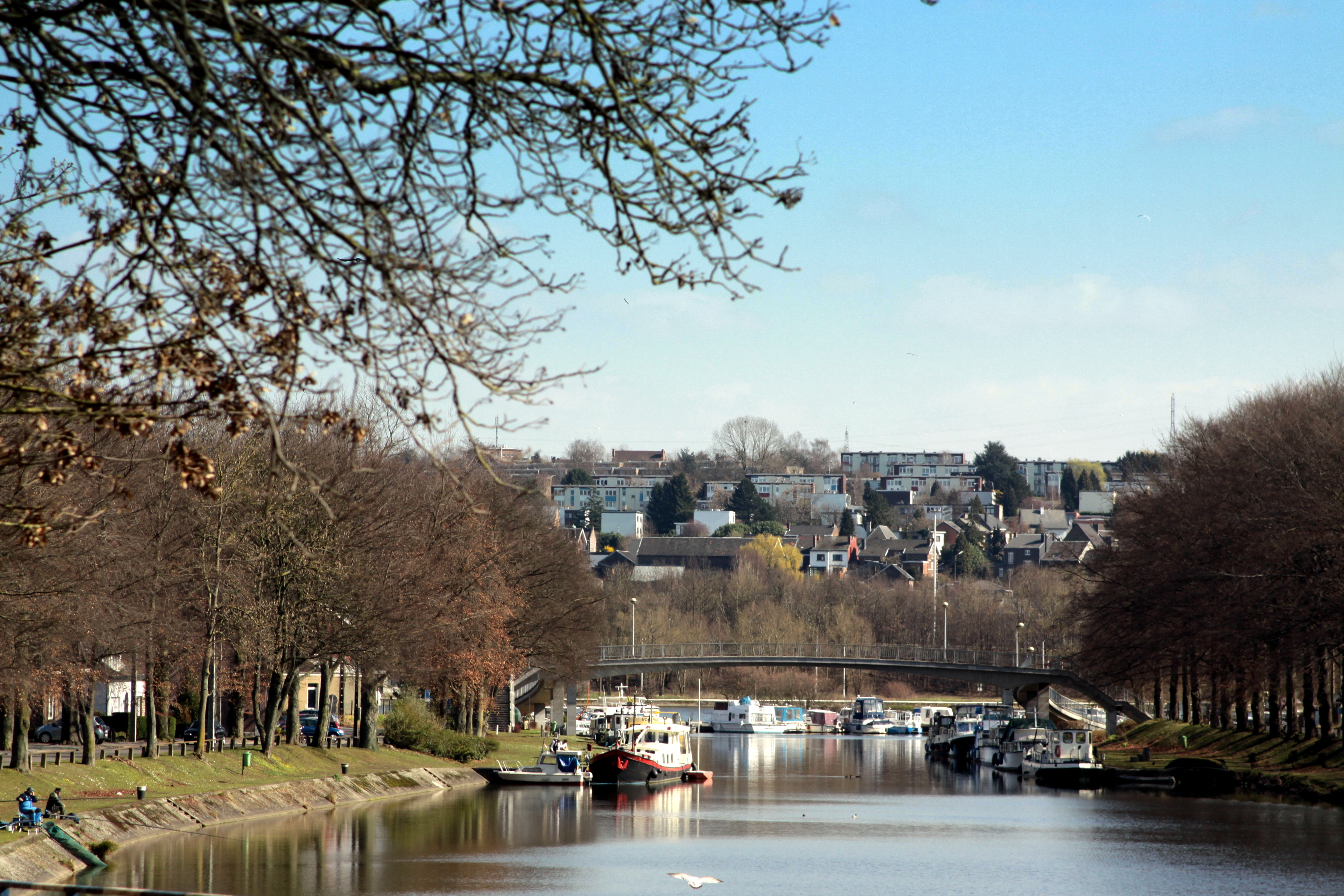 Canal Visé an Direktioun Meuse gesinn